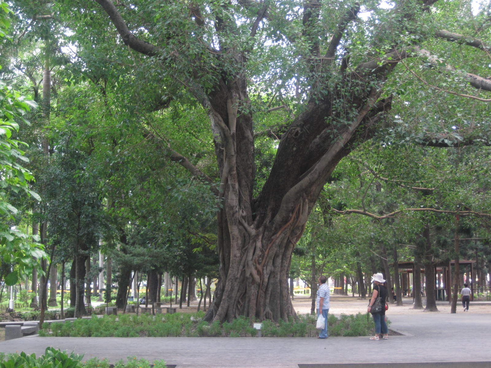 台南公園菩提樹，為市府認定的珍貴樹木 Bân-lâm-gú: Tī Tâi-lâm Kong-hn̂g ê Phôo-tê-tshiū. I sī tshī-tsìng-hú jīn-tīng kuè ê tin-kuì tshiū-bo̍k. 佇臺南公園的菩提樹，伊是市政府認定過的珍貴樹木。